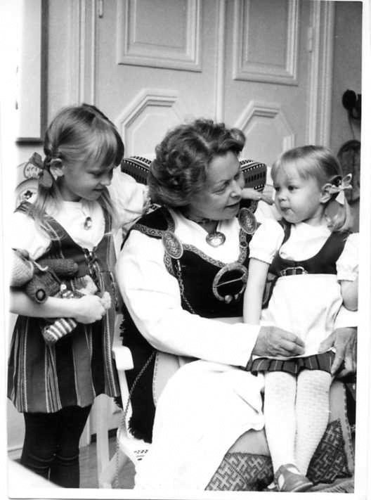 Kastehelmi Karjalainen ja lapsenlapset Virpi ja Varpu Kalevalan päivänä 1971